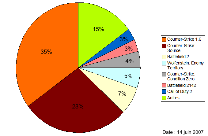 Répartitions des joueurs de FPS sur Internet.